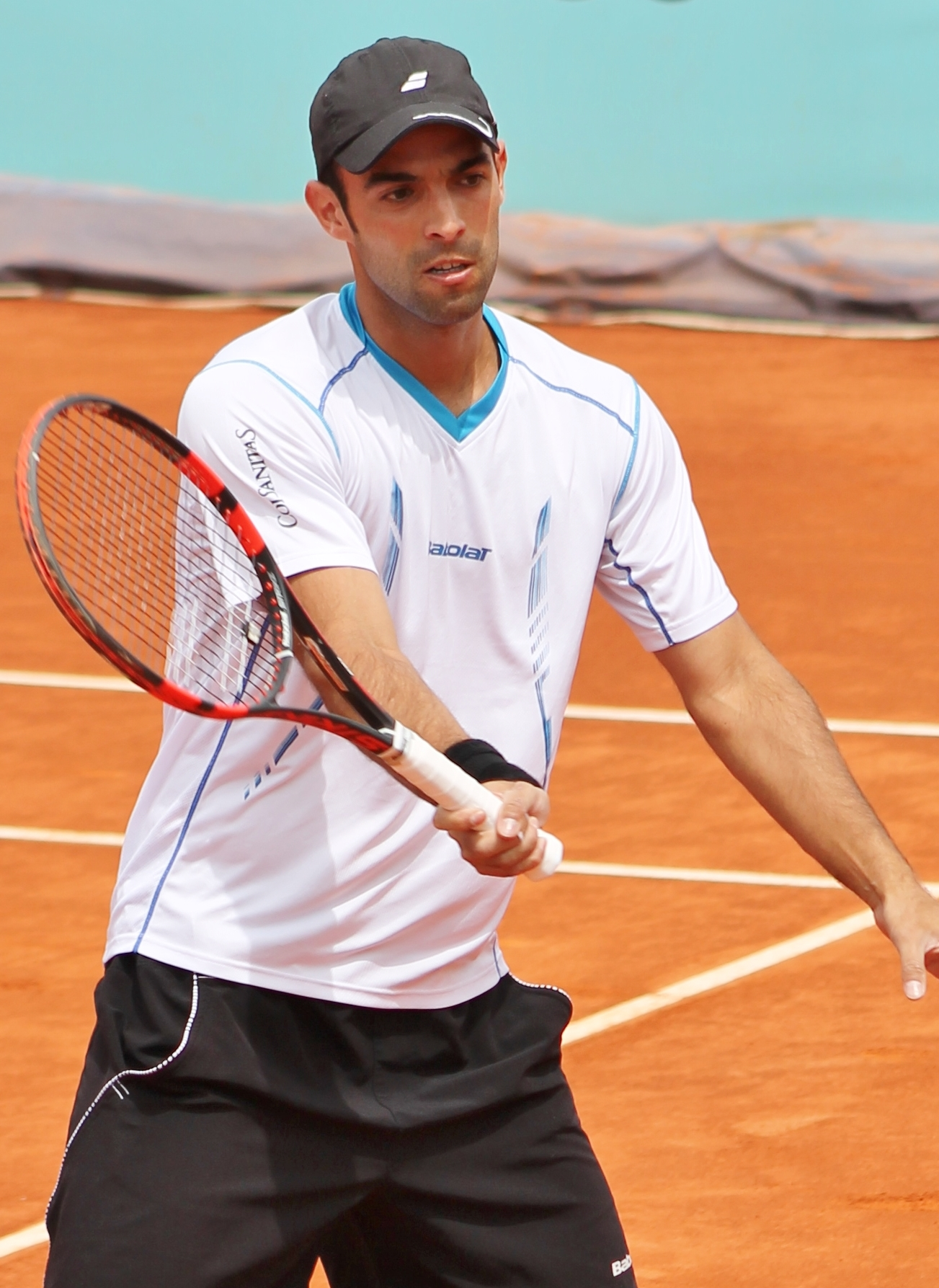 Cabal MA14